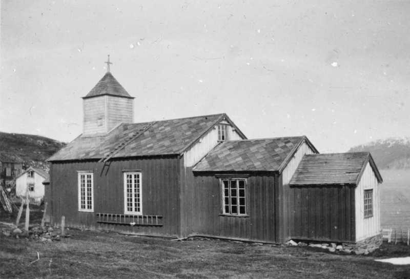 Skorpa kirke (church) in Kvænangen, Norway